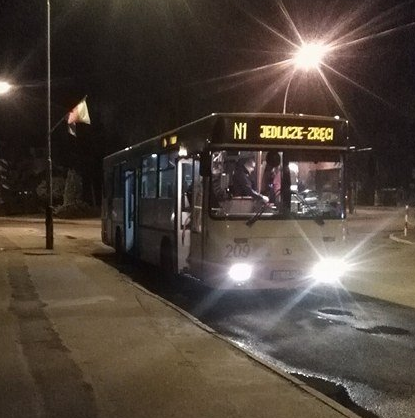 Autosan A1010M Medium z taboru MKS Krosno na linii N1 - przystanek Plac Monte Cassino